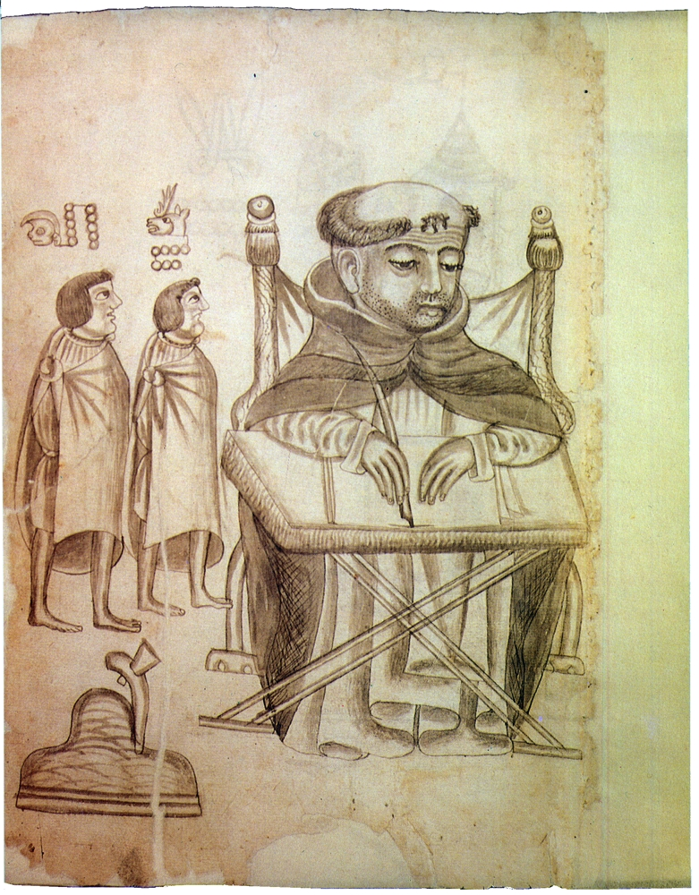 Lámina 19 del Códice de Yanhuitlán. Obra realizada por autores anónimos de la comunidad mixteca de Yanhuitlán (Oaxaca, México), hacia la mitad del siglo XVI. Colección de la Biblioteca HIstórica José María Lafragua (Puebla, México).